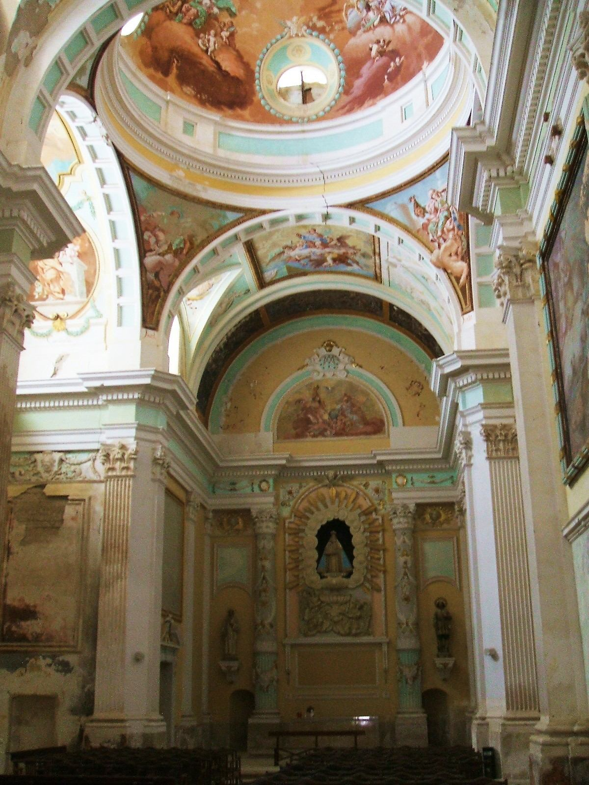 Cabecera y crucero de la iglesia de la Cartuja de Nuestra Señora de las Fuentes (Cartuja de Monegros), en el término municipal de Sariñena, Huesca, Aragón, España.